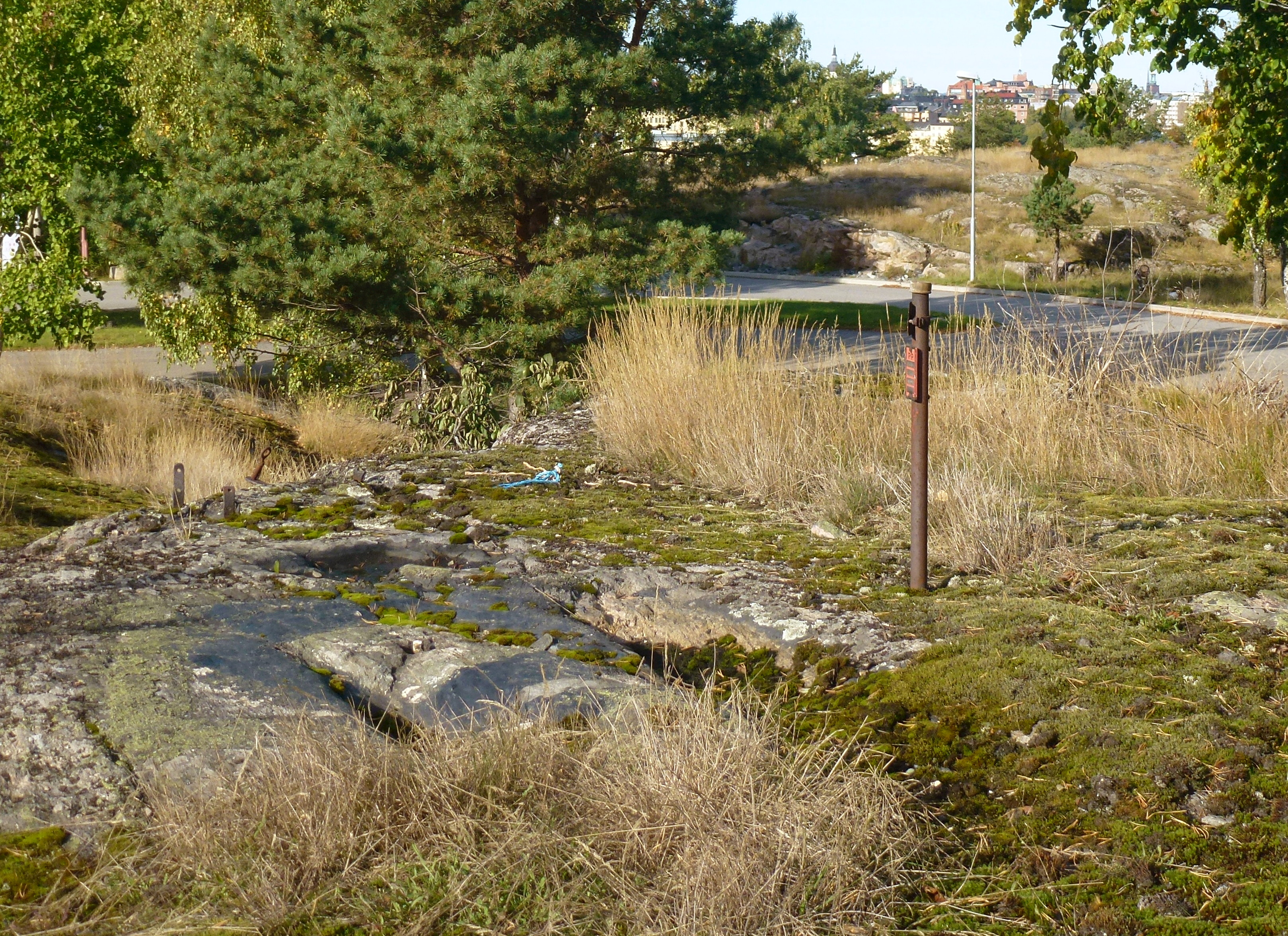 Henriksdalsberget: den högsta punkten inom Stockholms innerstad, 57 meter över havet.